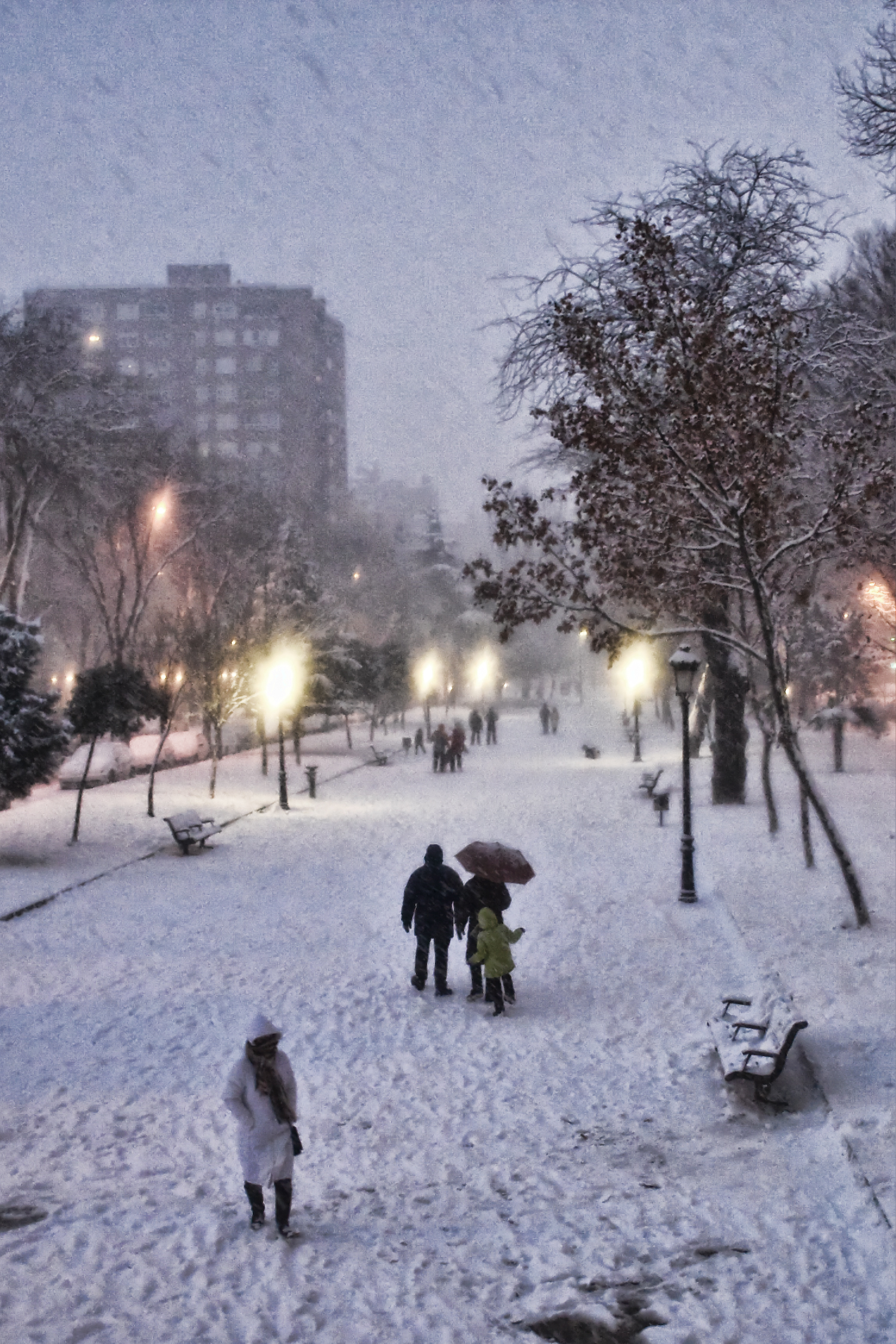 Aquel fue un día genial para los amantes de la fotografía.